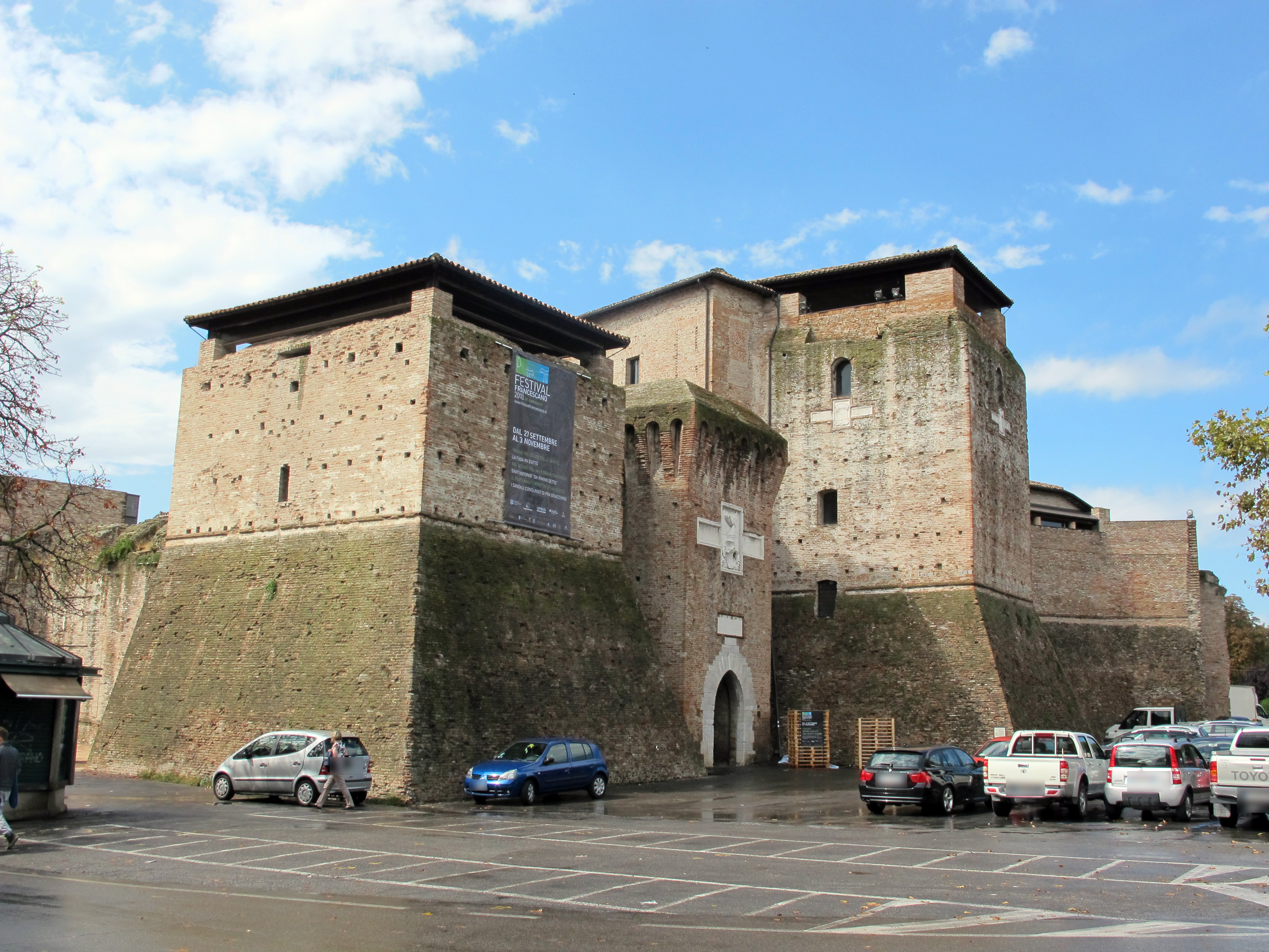 Castel Sismondo - MIBAC This is a photo of a monument which is part of cultural heritage of Italy.